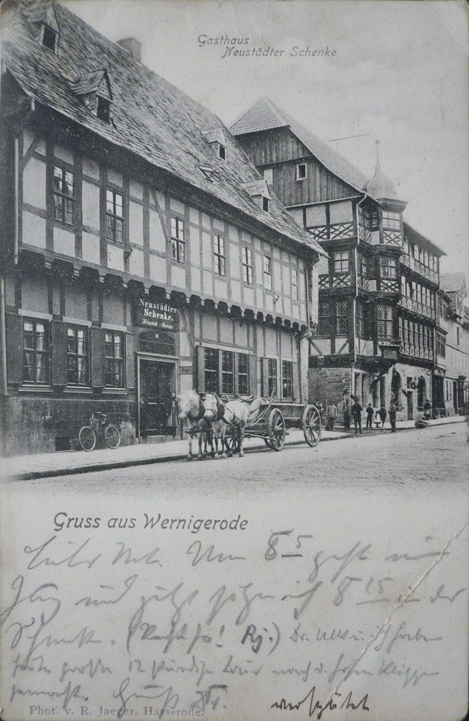 Blick auf die Neustädter Schenke und das Faulbaumsche Haus in der Breiten Straße in Wernigerode